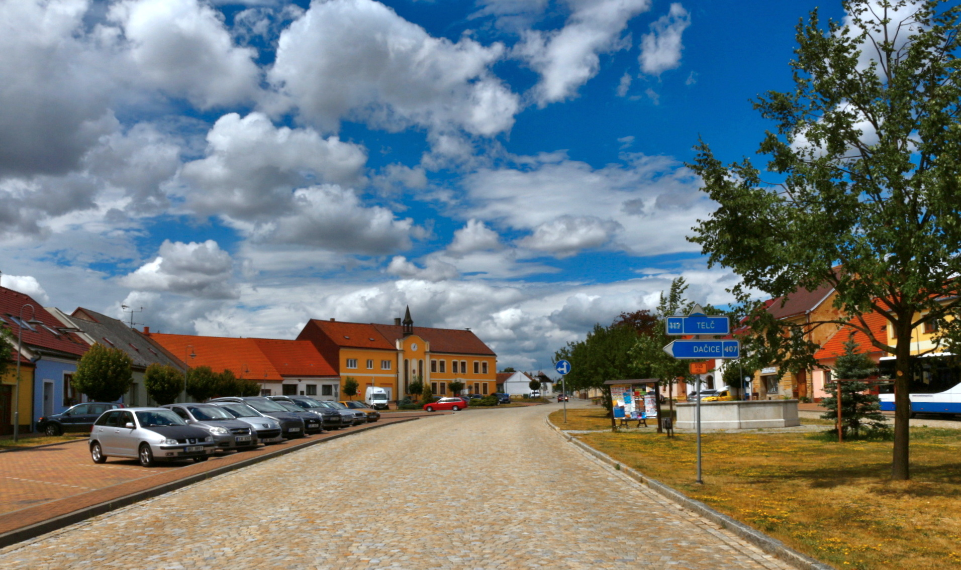 Nová Říše